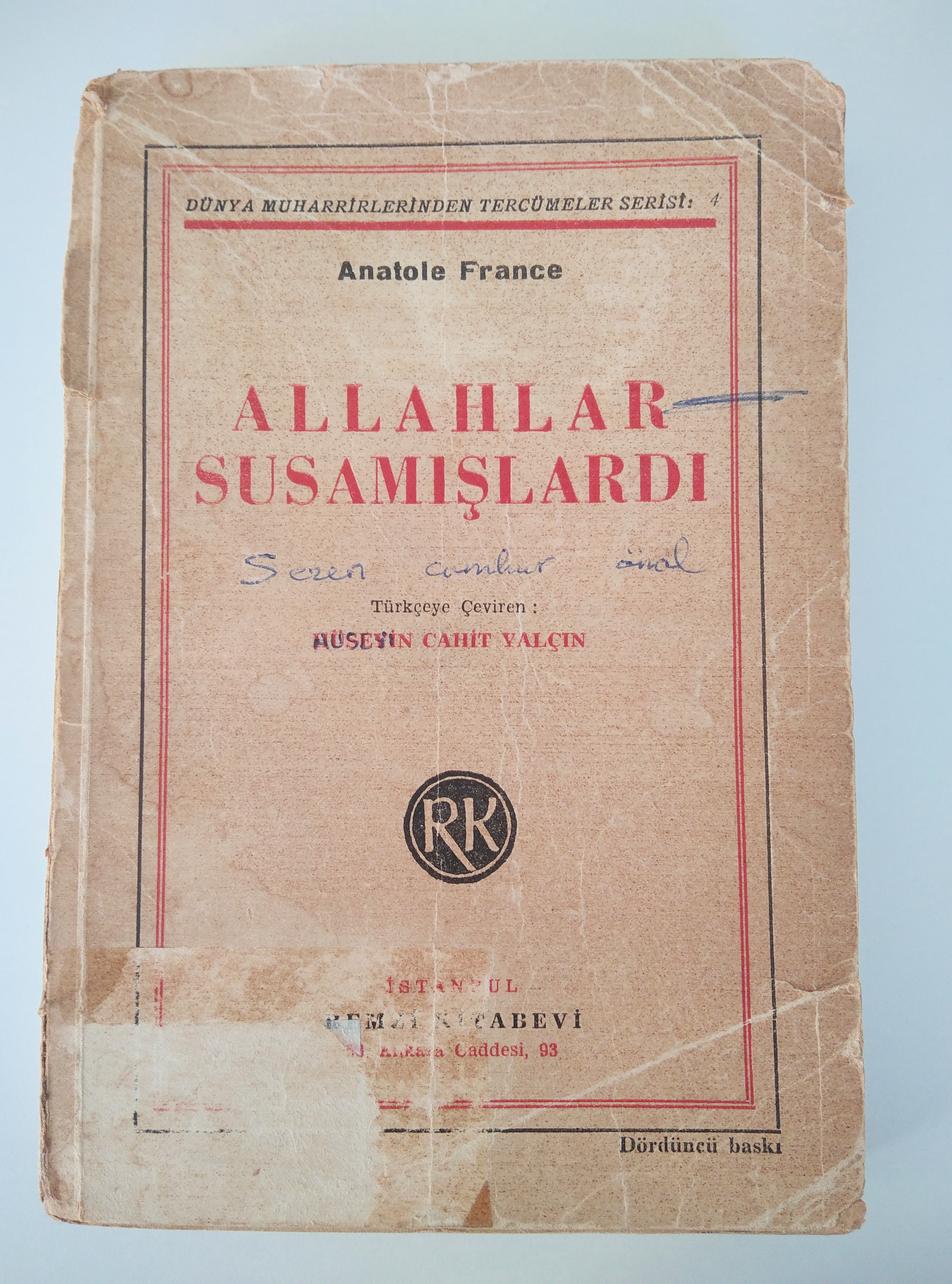 Analone France'ın yazdığı Allahlar Susamışlardı adlı kitabının Remziye Kitabevi tarafından basılan halinin kapağı